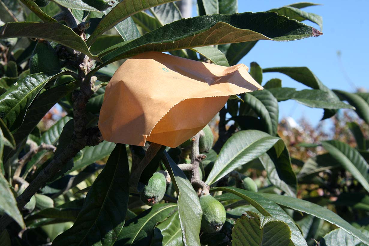 mise en sac d'une main éclaircie